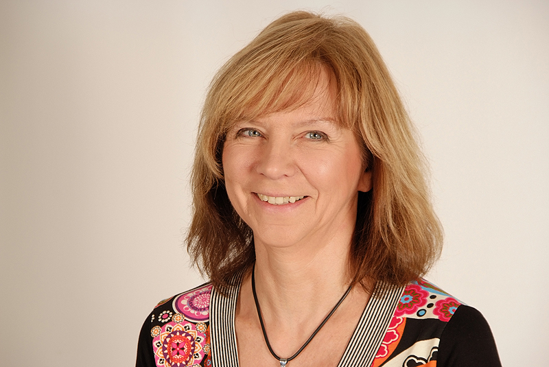 Sigrid Rakow, Landtagsabgeordnete Niedersachsen, 16. Wahlperiode (Fotoprojekt Landtagsabgeordnete Niedersachsen am 24. und 25. November 2009)